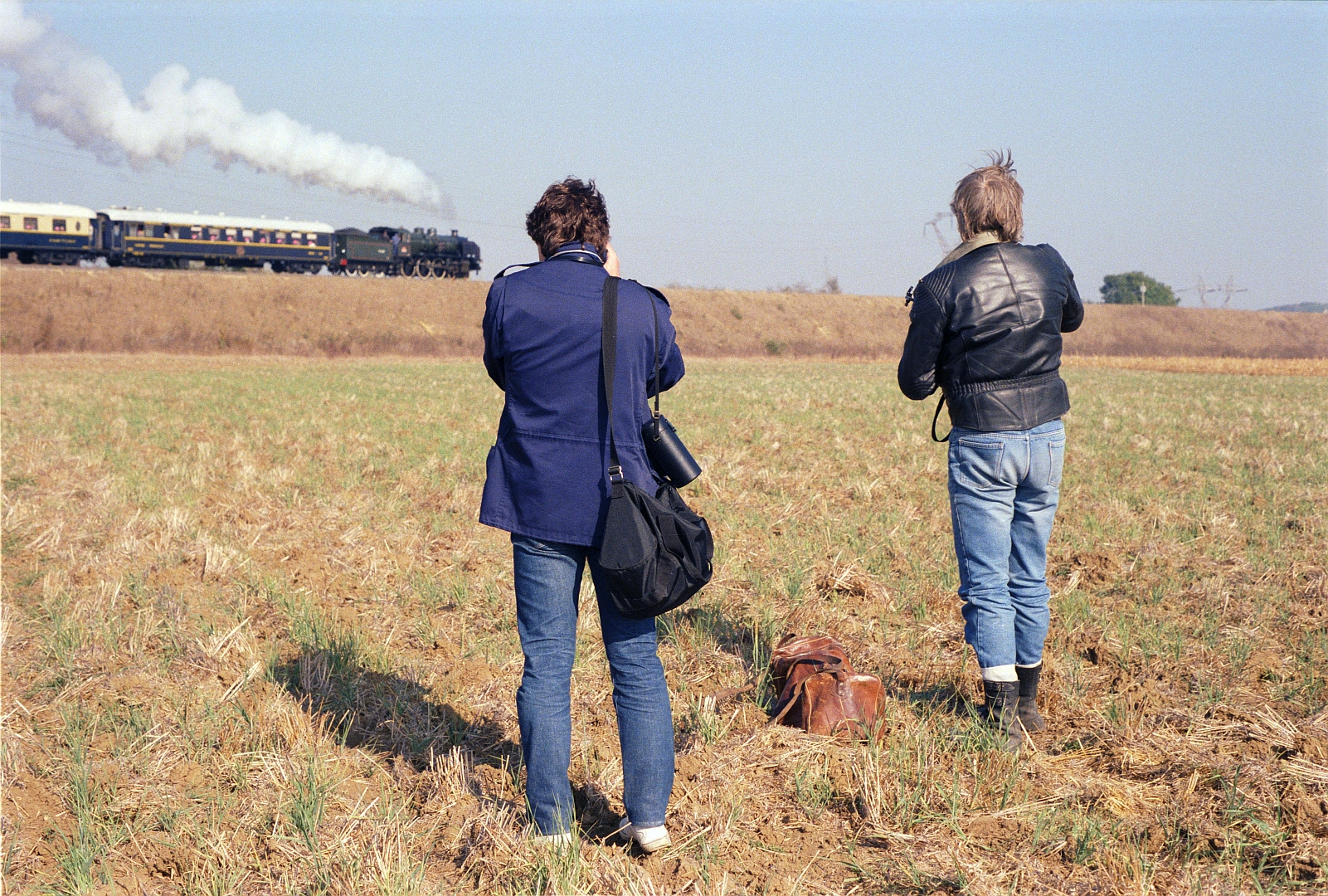 Photographes ferroviaires et la 230 G 353 à Montereau le 20 octobre 1985.